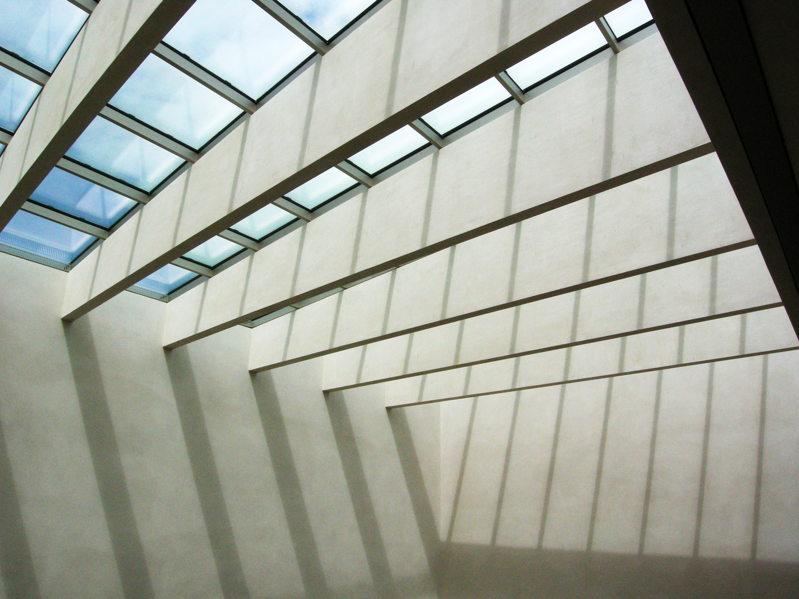 Bregenz – vorarlberg museum Dieses Bild wurde anlässlich des österreichischen Tags des Denkmals 2014 in Vorarlberg eingereicht.